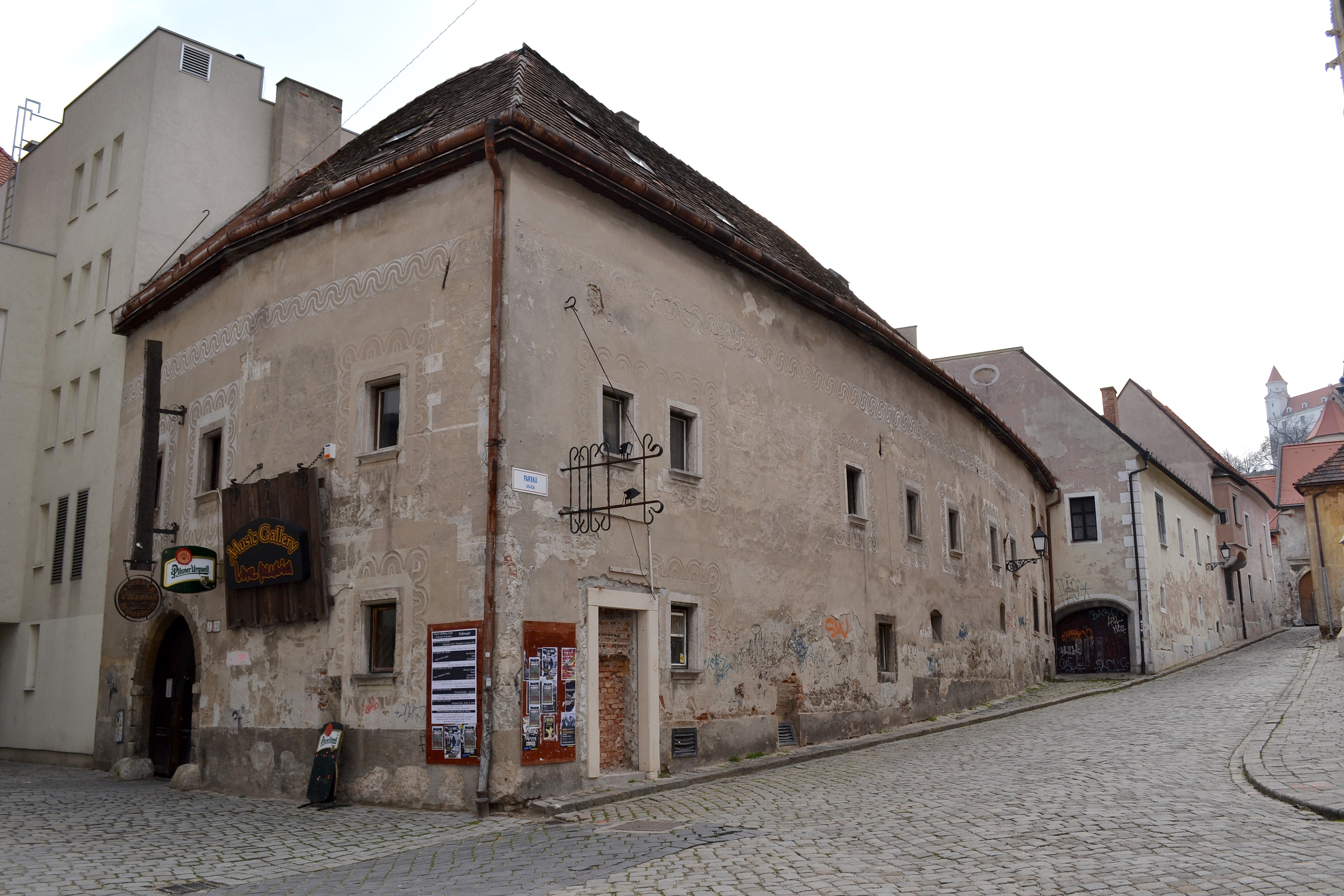 Klariská ul. č. 1. Celkový pohľad Object location48° 08′ 38.04″ N, 17° 06′ 20.88″ E